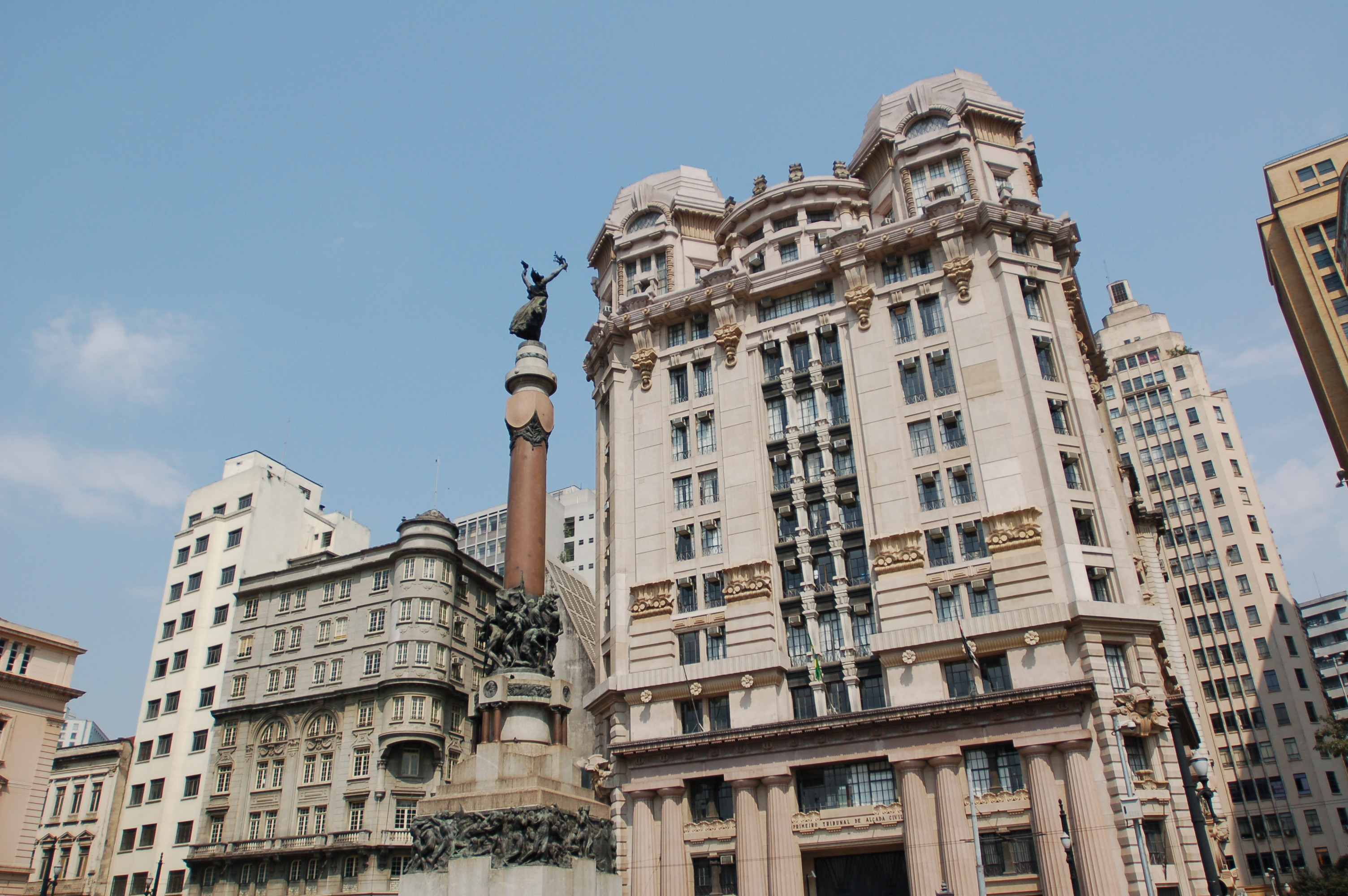 Central square in São Paulo, Brazil